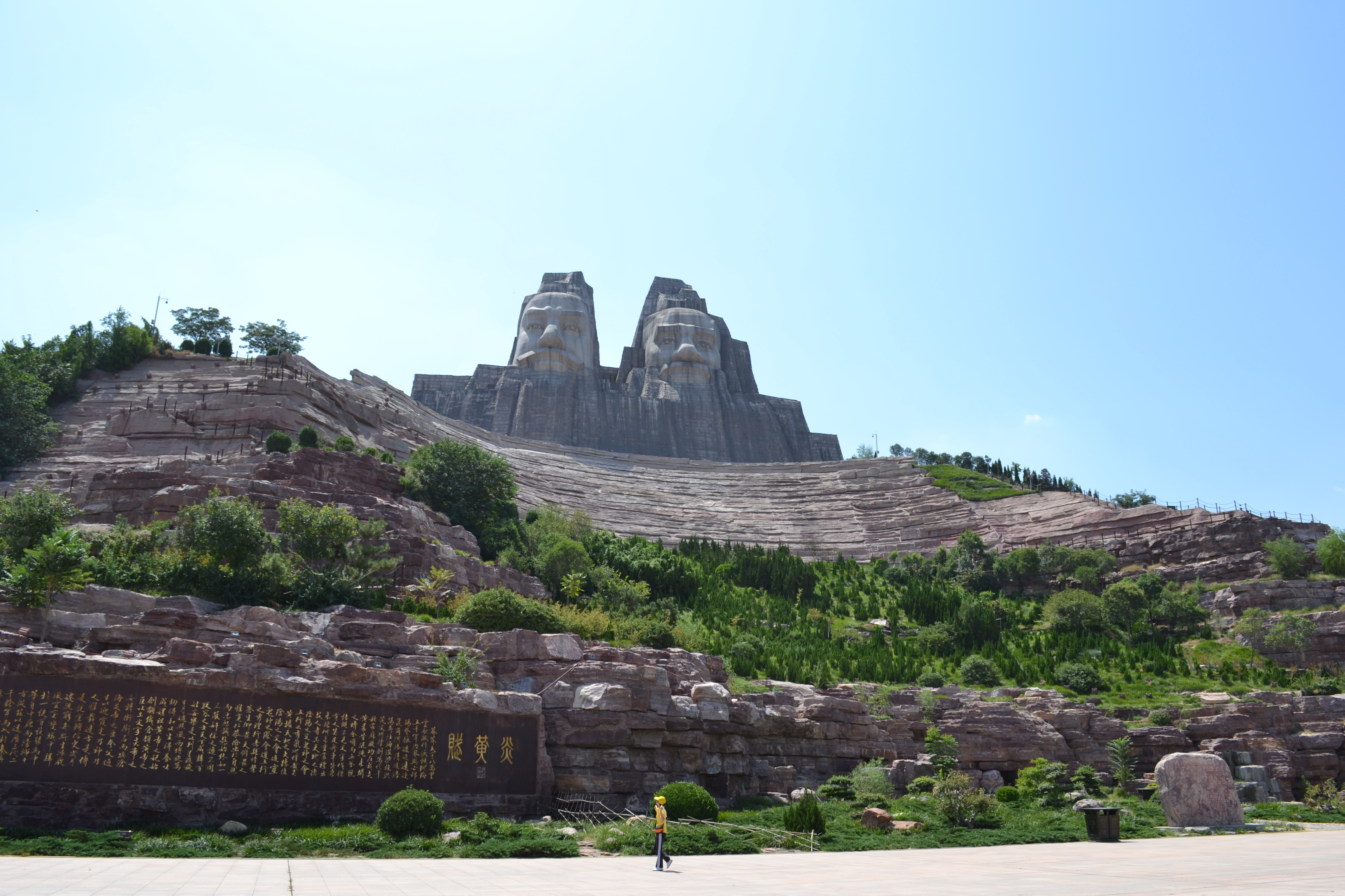 中文（中国大陆）: 主体为郑州黄河风景名胜区炎黄二帝巨型雕像